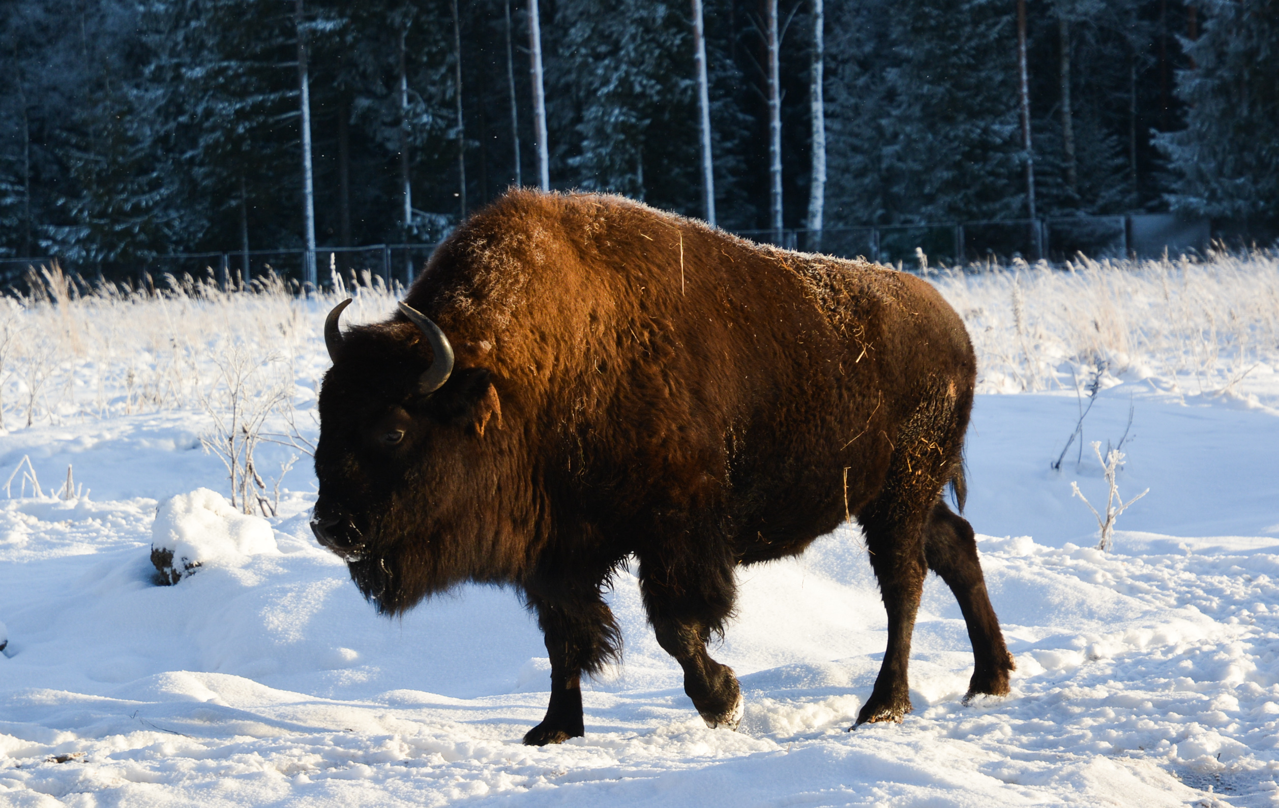 Зубробизон в Ново-Кавголовском лесопарке посёлка Токсово, близ Санкт-Петербурга (Россия)